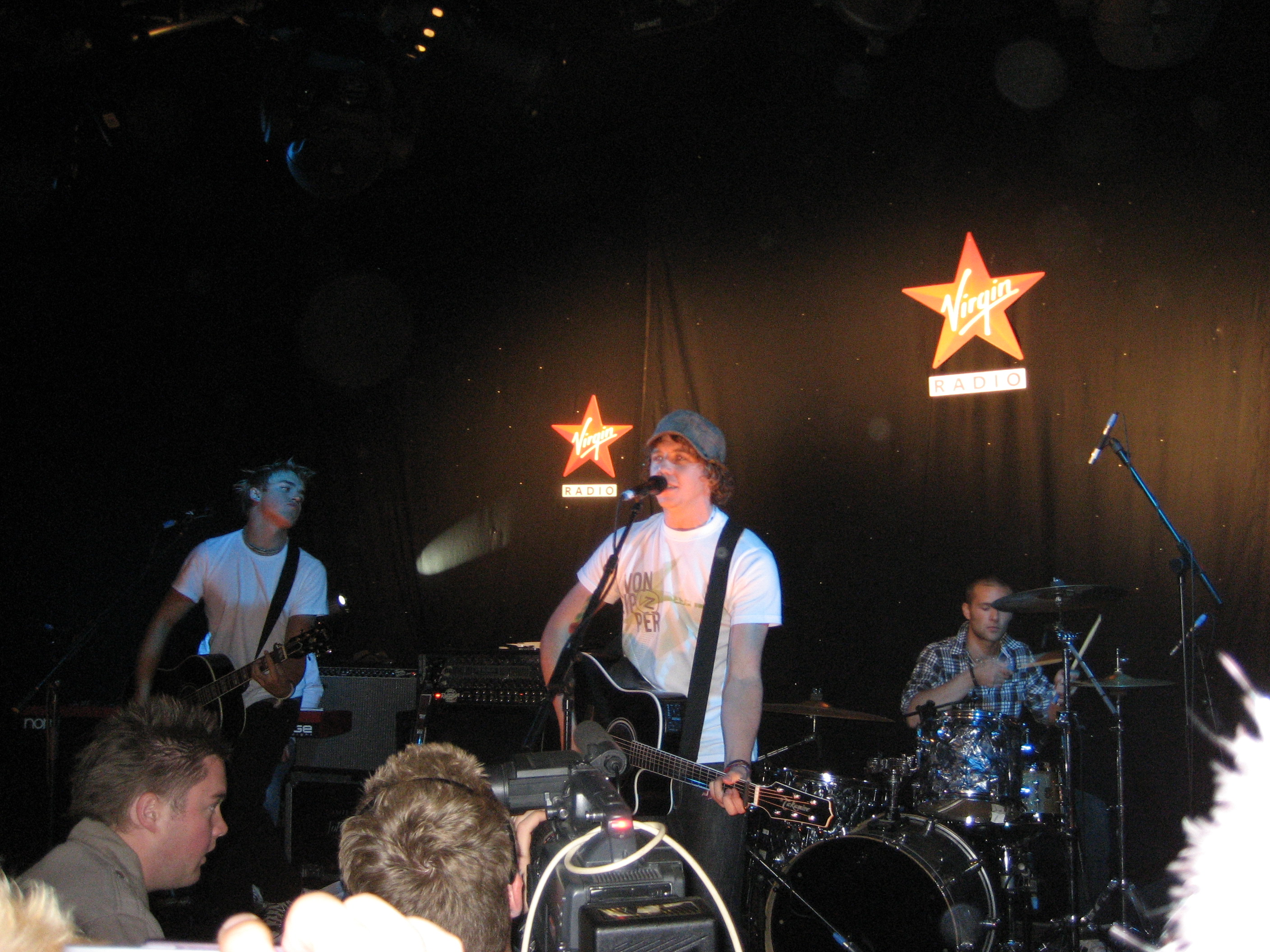 McFly gig